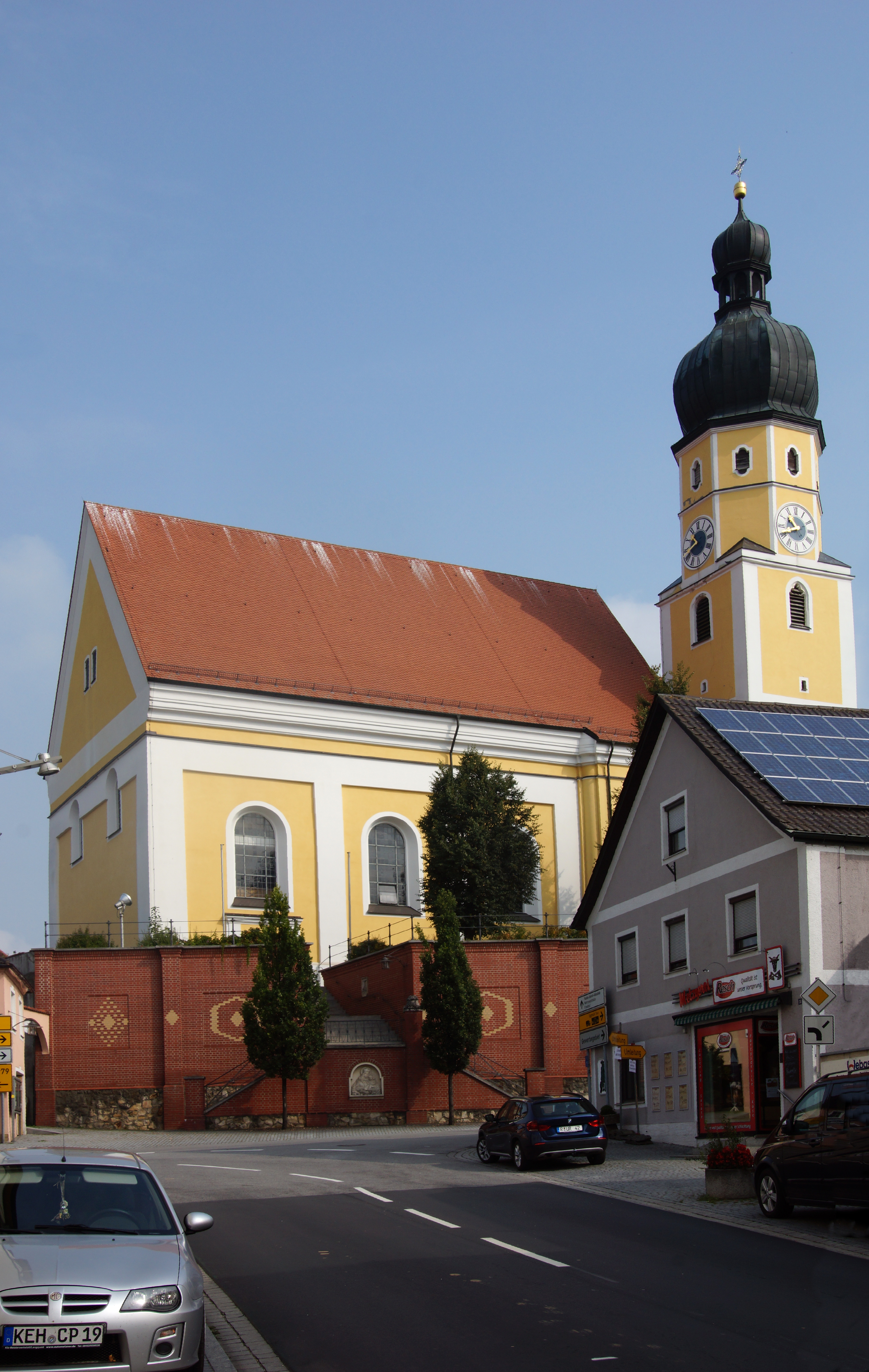 Die katholische Pfarrkirche St. Peter und Paul im Oberpfälzer Markt Schierling